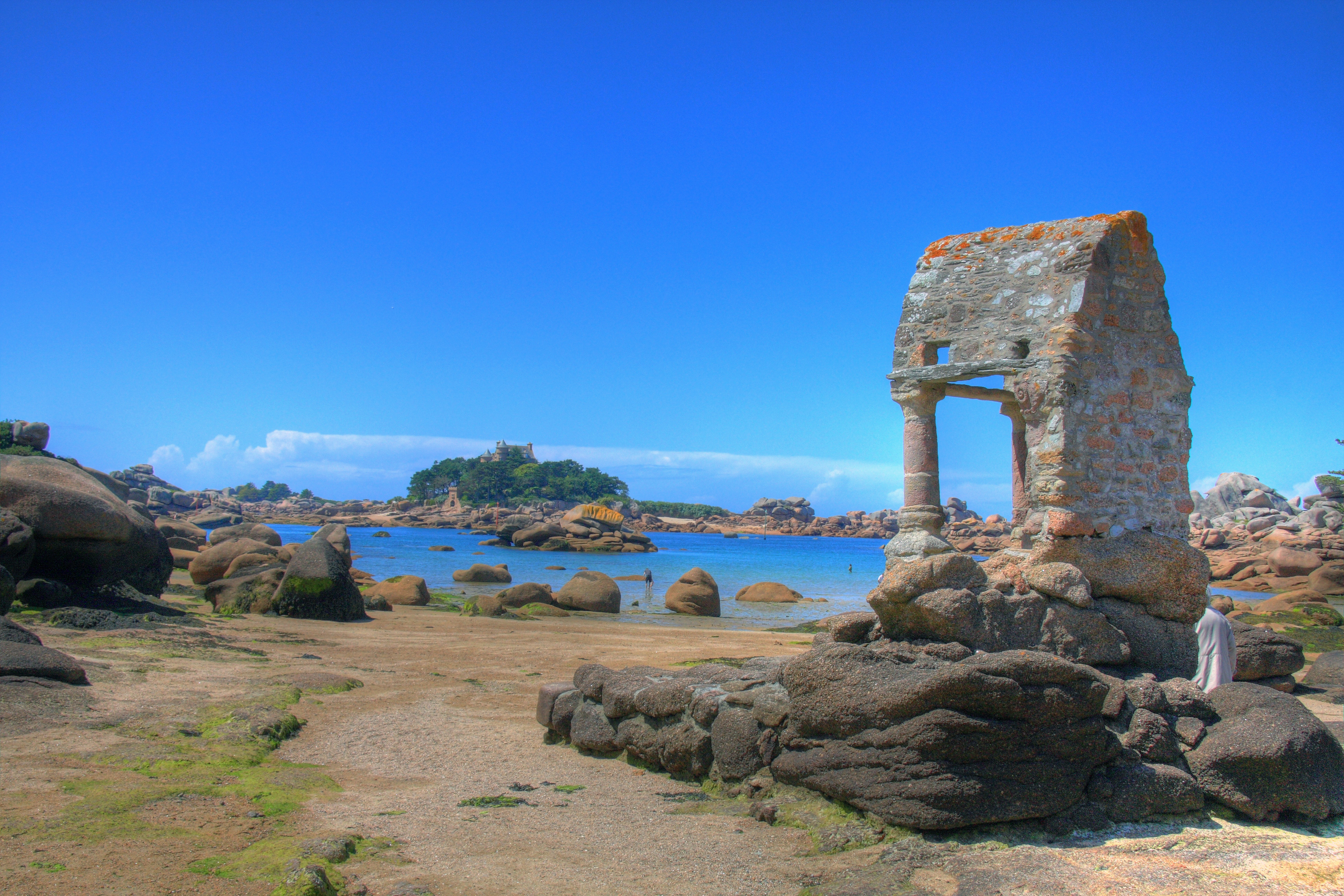 Ploumanach